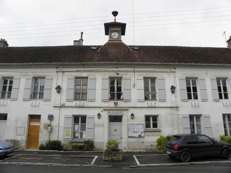 Mairie de Sablonnières (77).